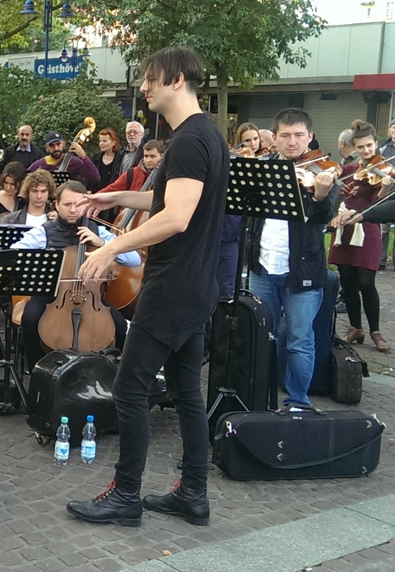 Currentzis 2015 in Marxloh